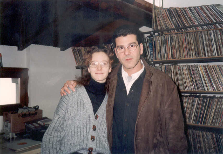 Michele Zarrillo / Archivio personale di Cinzia Donati